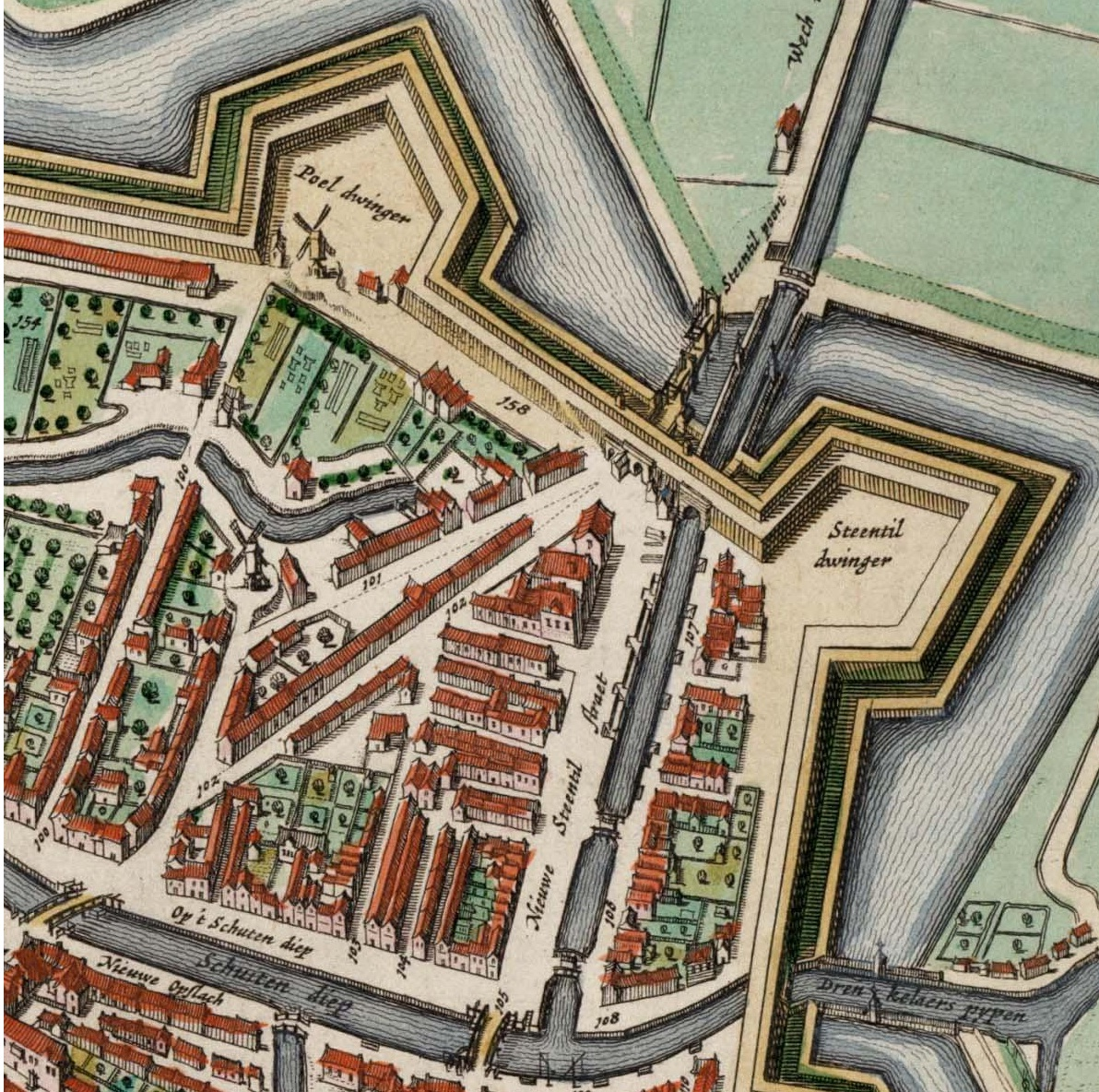 Fragment van de Atlas van Loon met de locatie van de Steentilpoort